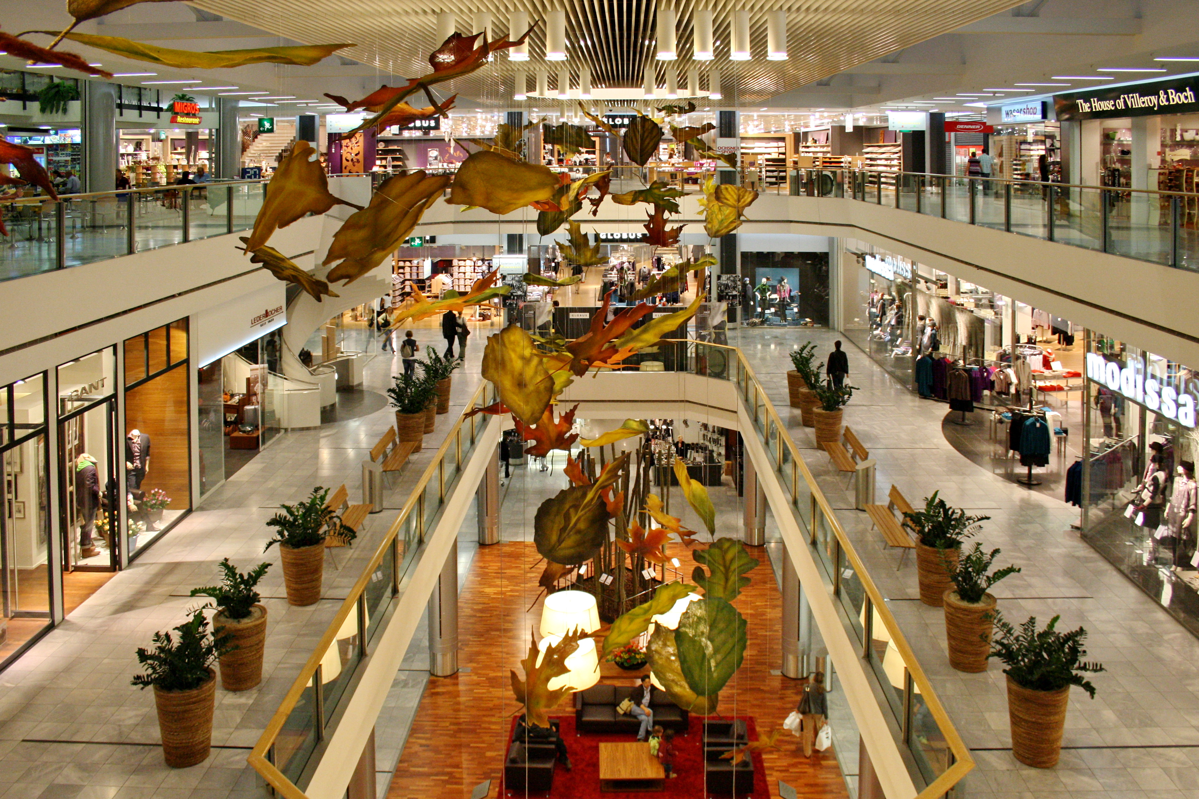 Glattzentrum in Wallisellen (Switzerland)